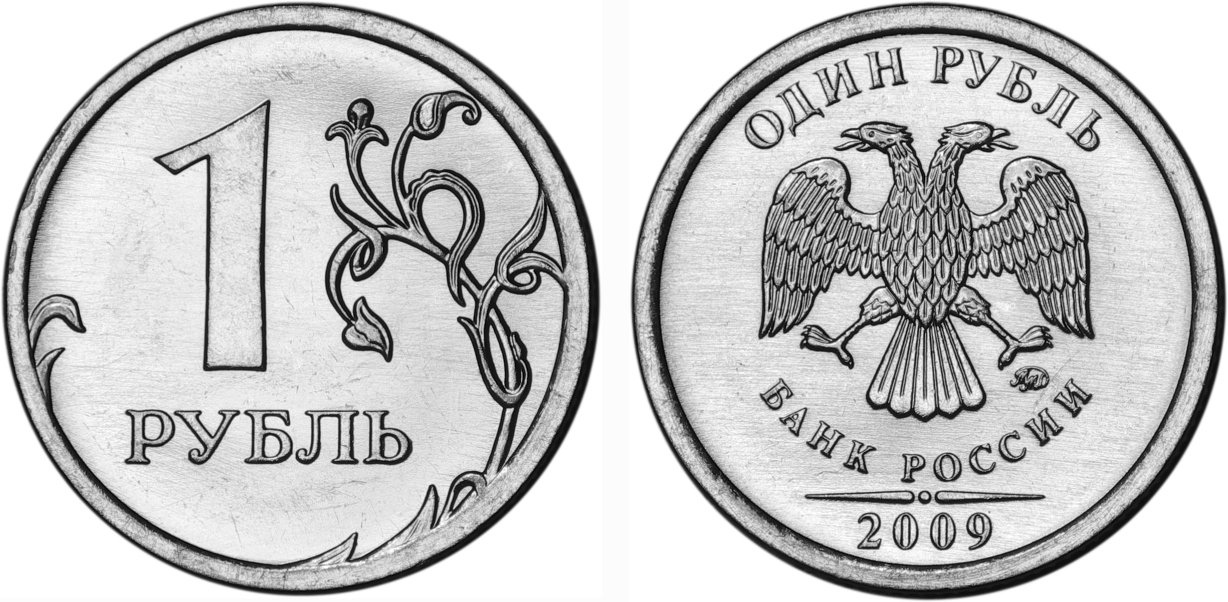 1 рубль РФ